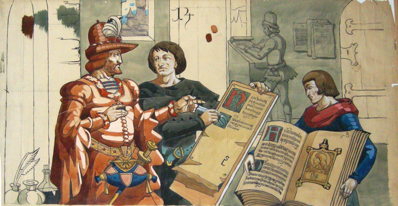 Aquarelle, fin du 19ème siècle. Transposée en mosaïque à l'entrée du musée, voir Haguenau 2010 CIMG8191 (40020600813).jpg